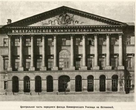 Часть переднего фасада здания Коммерческого училища на Остоженке